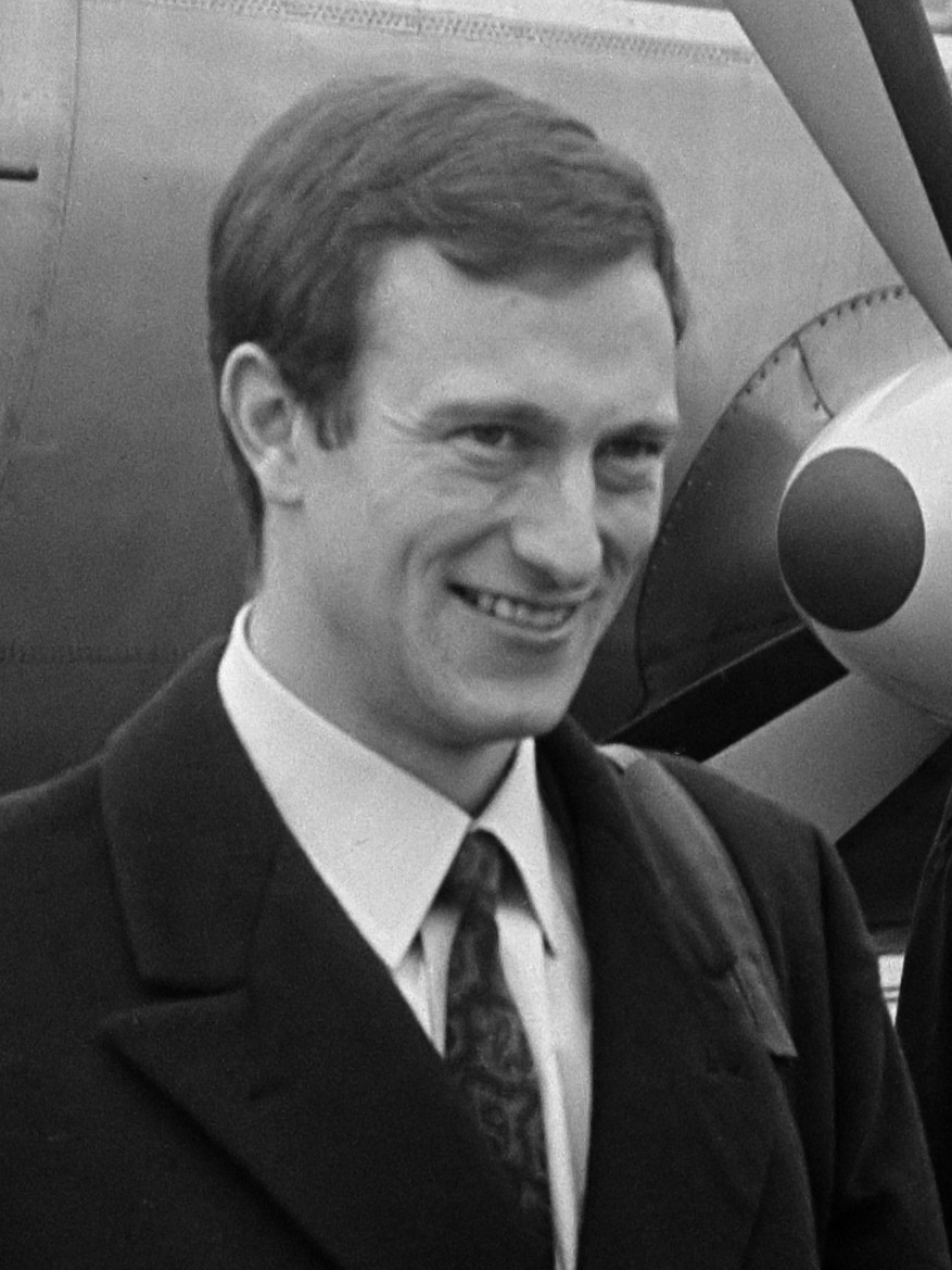 Aankomst prinses Kira van Pruissen en haar broer prins Friedrich Wilhelm van Pruissen op Schiphol 8 maart 1966